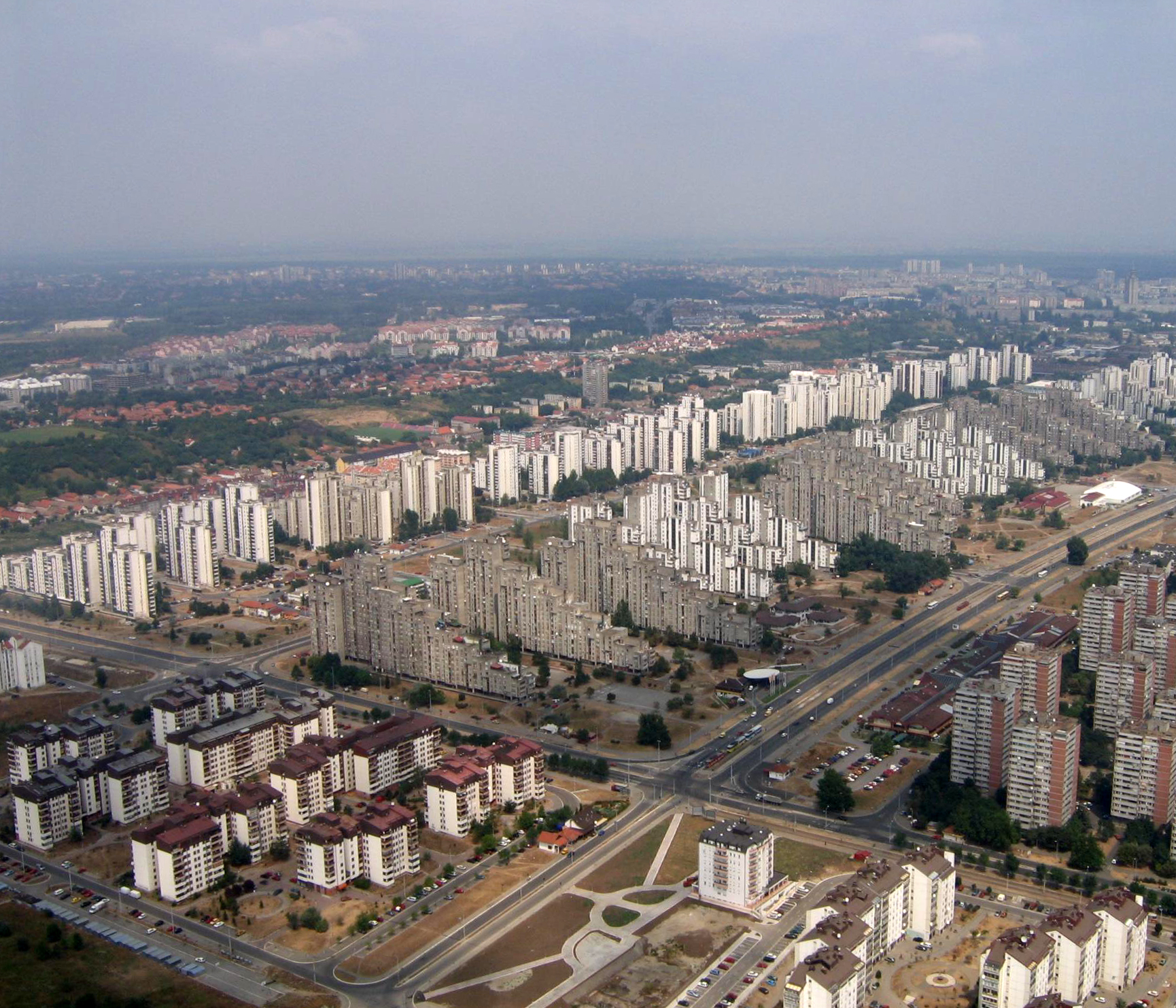 Photographie du quartier Bežanijski Blokovi dans la municipalité de Novi Beograd à Belgrade